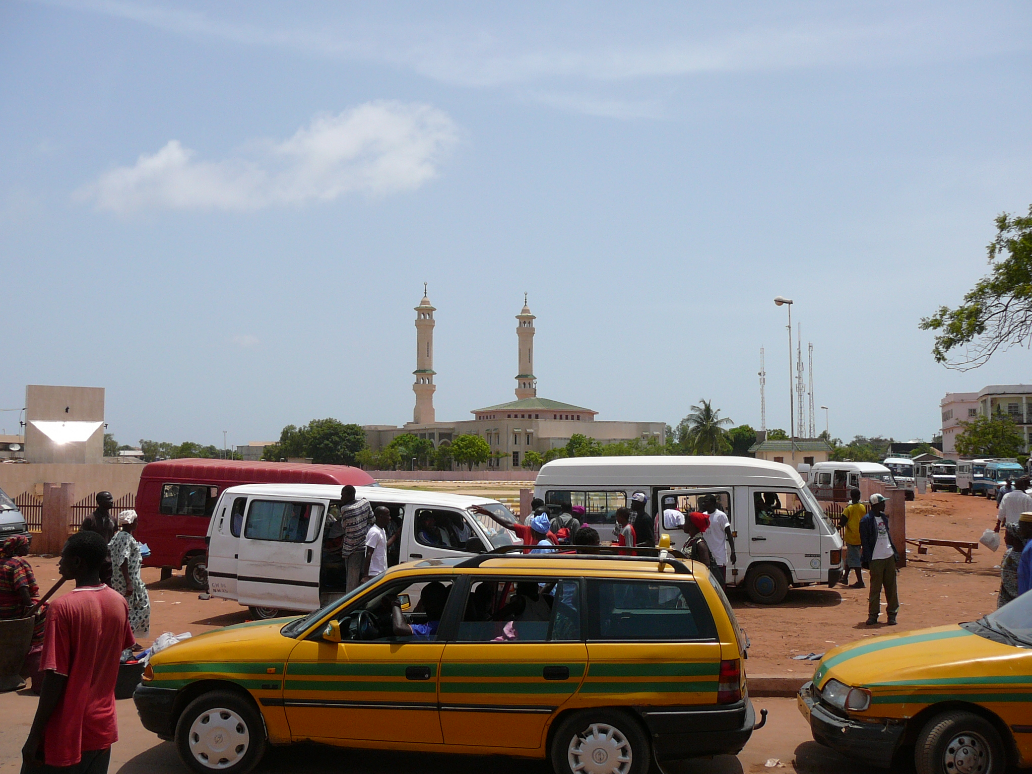 Straße in Banjul